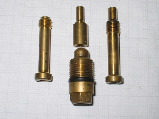 Emulsionatore per carburatori motociclistici a ghigliottina